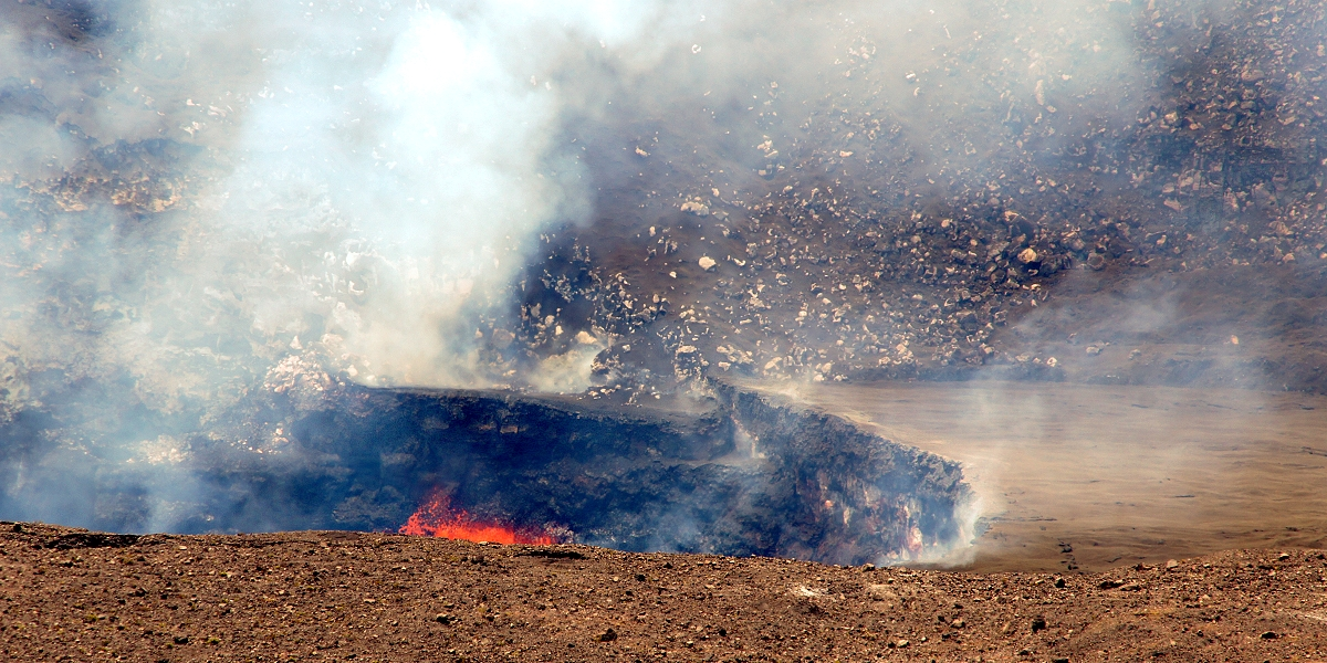 Иллюстрация для викиучебника Гавайеведение